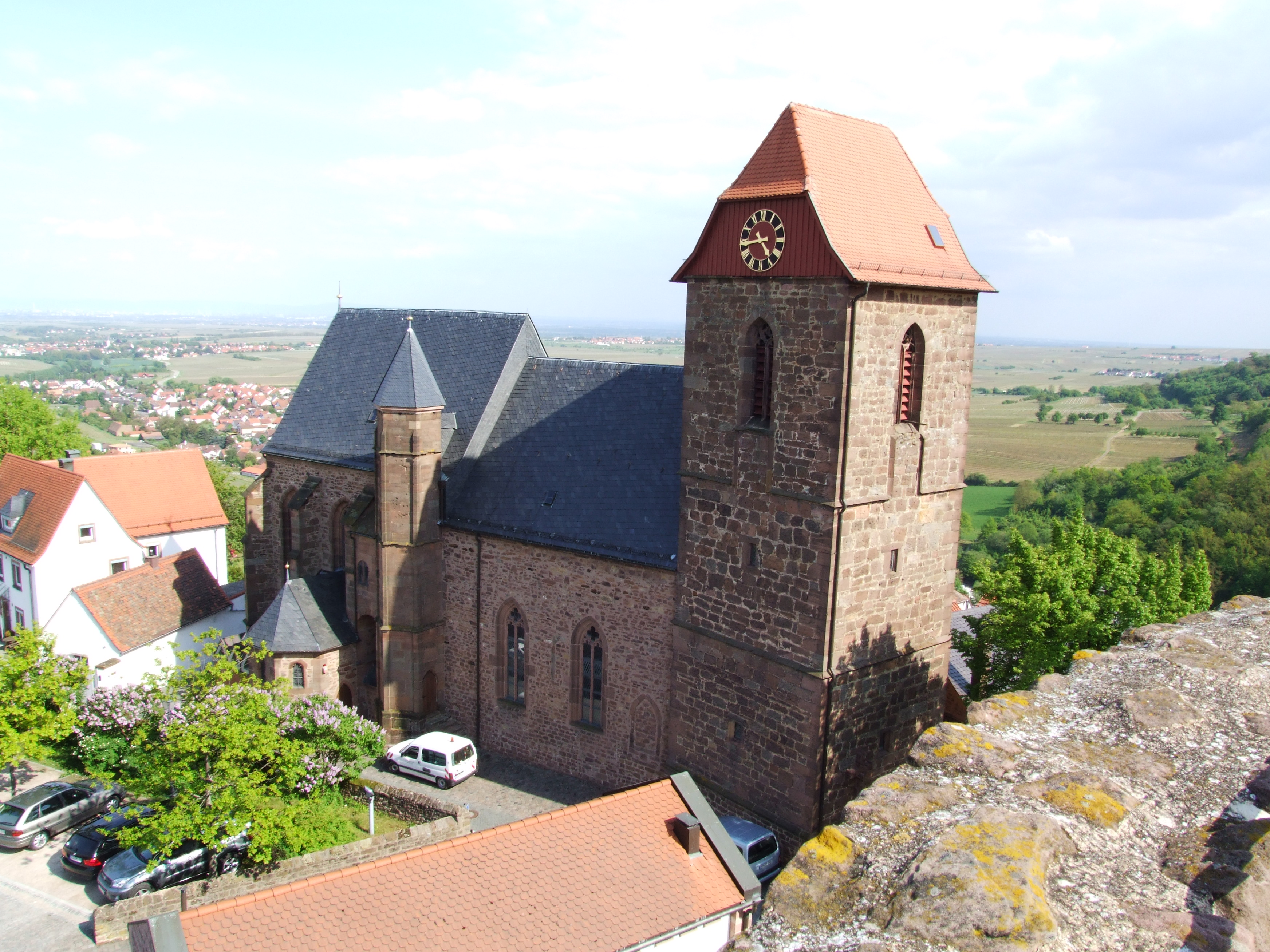 Pfarrkirche St. Nikolaus, Neuleiningen, von der Burg aus fotografiert.